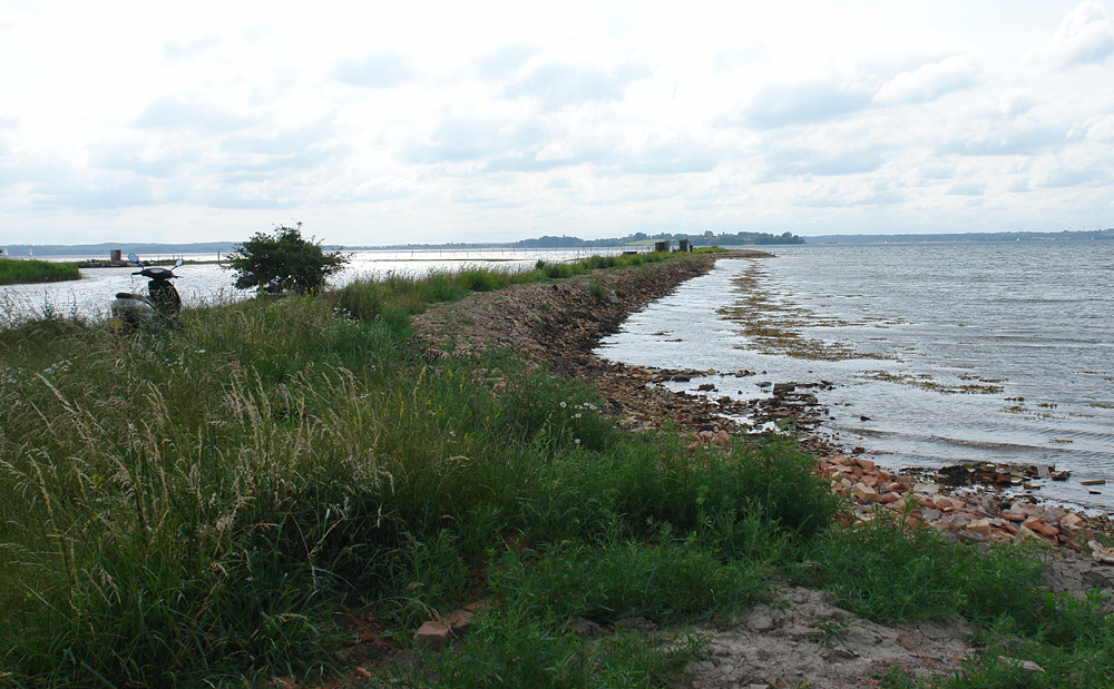 Cathrinesminde Teglvaerk an der Flensburger Förde. Als Ziegelei gegründet 1732, stillgelegt 1968. 1986 bis 1993 restauriert, heute Ziegeleimuseum. Der alte Anleger